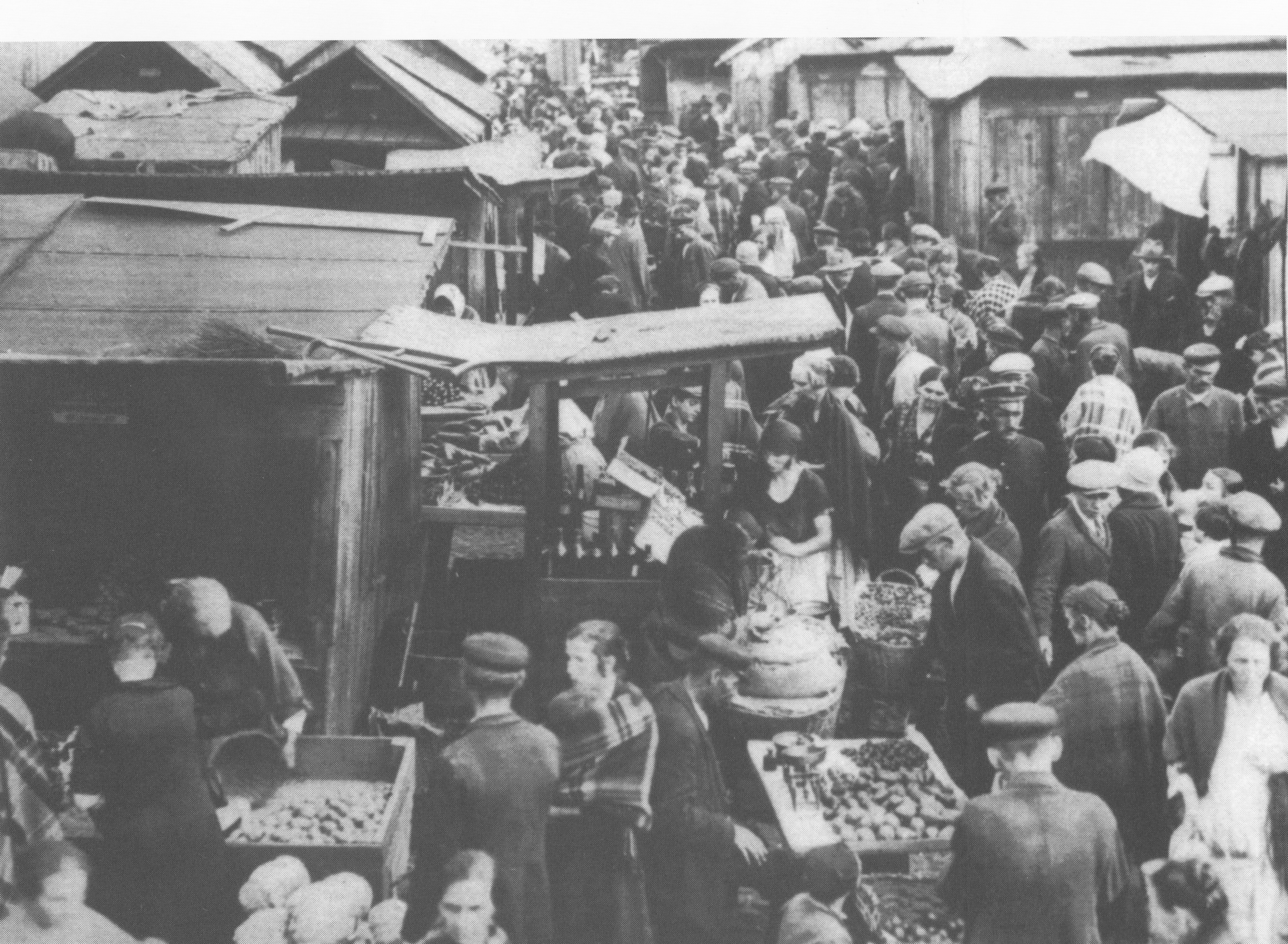 Targowisko na placu Kerecelego w Warszawie